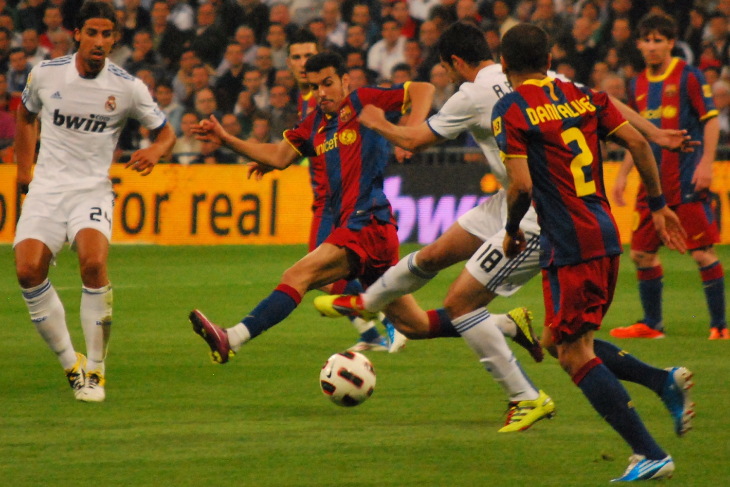 RMadrid-Barca_26